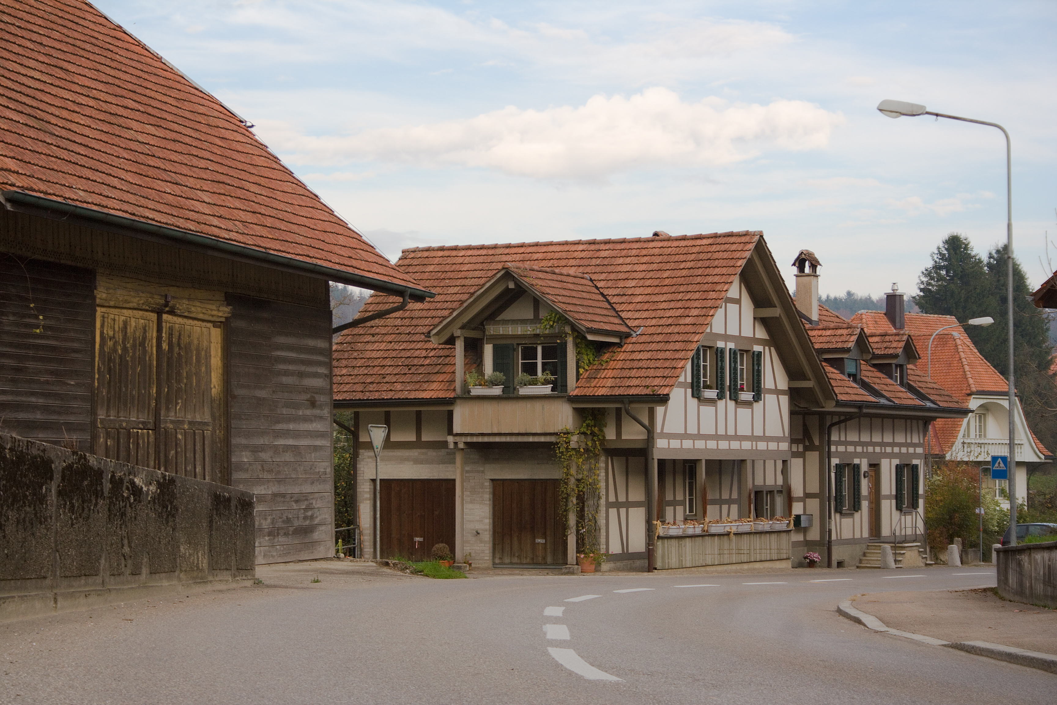 Riegelhäuser an der Hauptstrasse in Lüterkofen, Schweiz